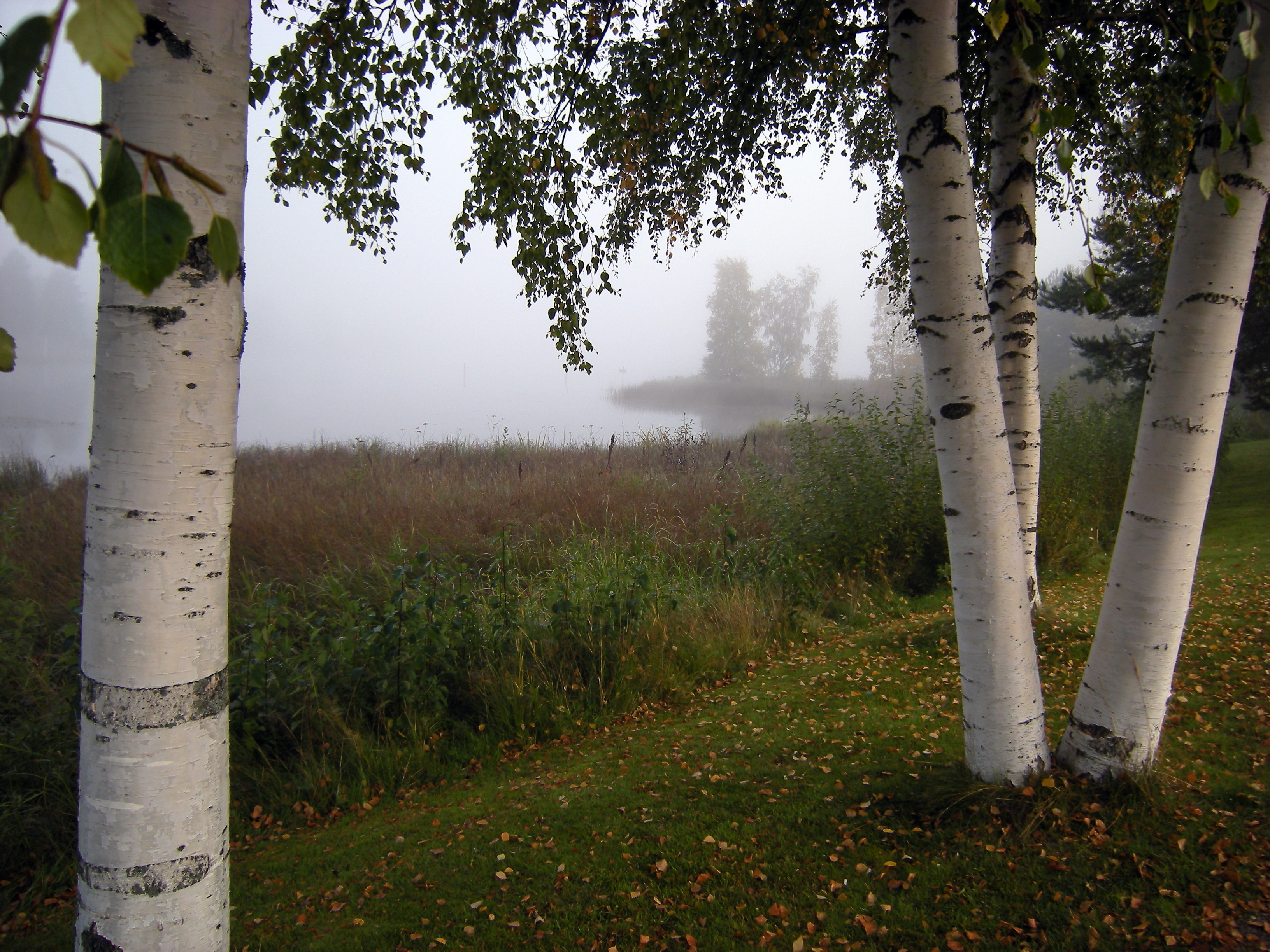 Torsång, vatten, björkar, tidig morgon.